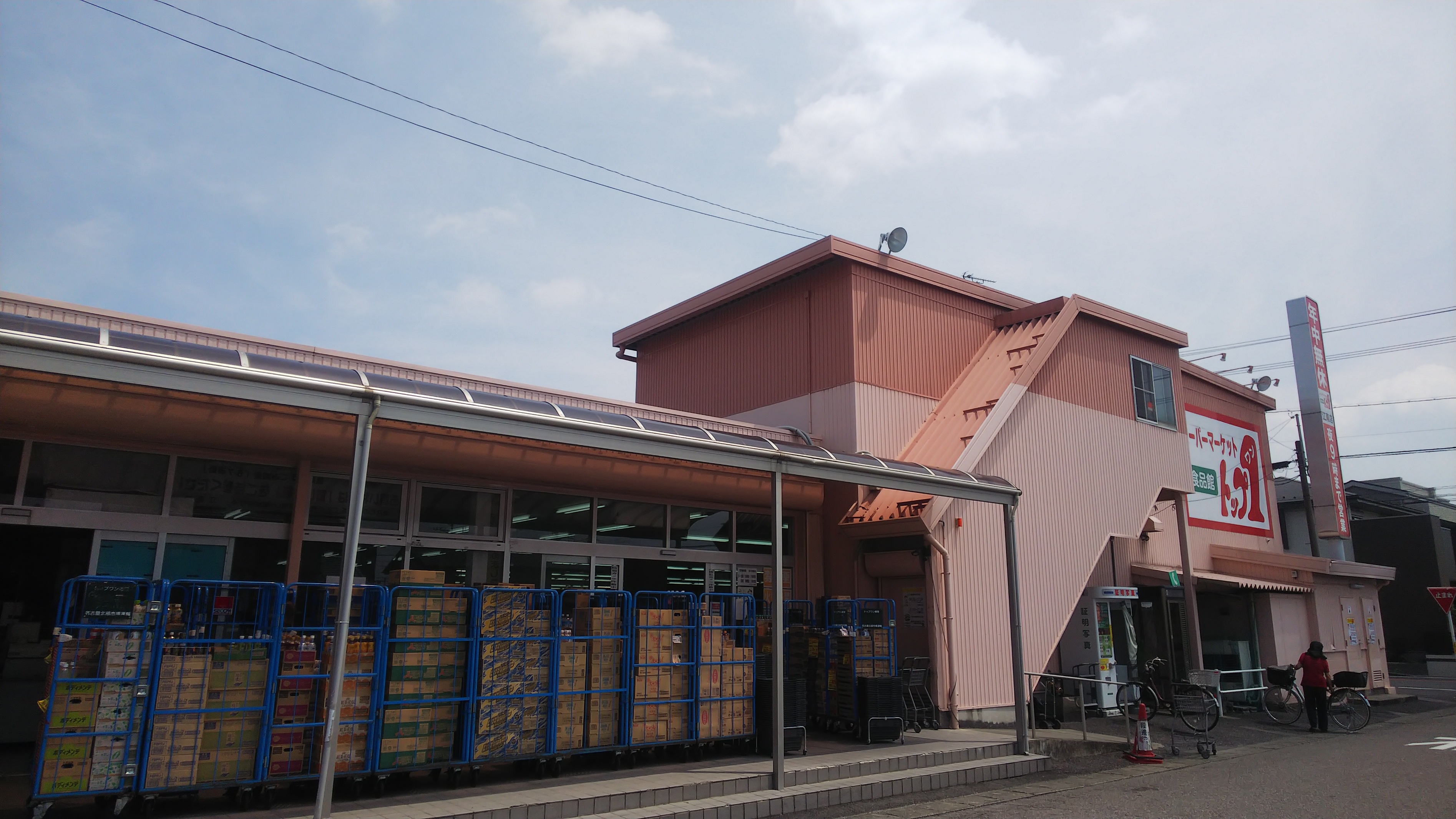 トップワン江南店